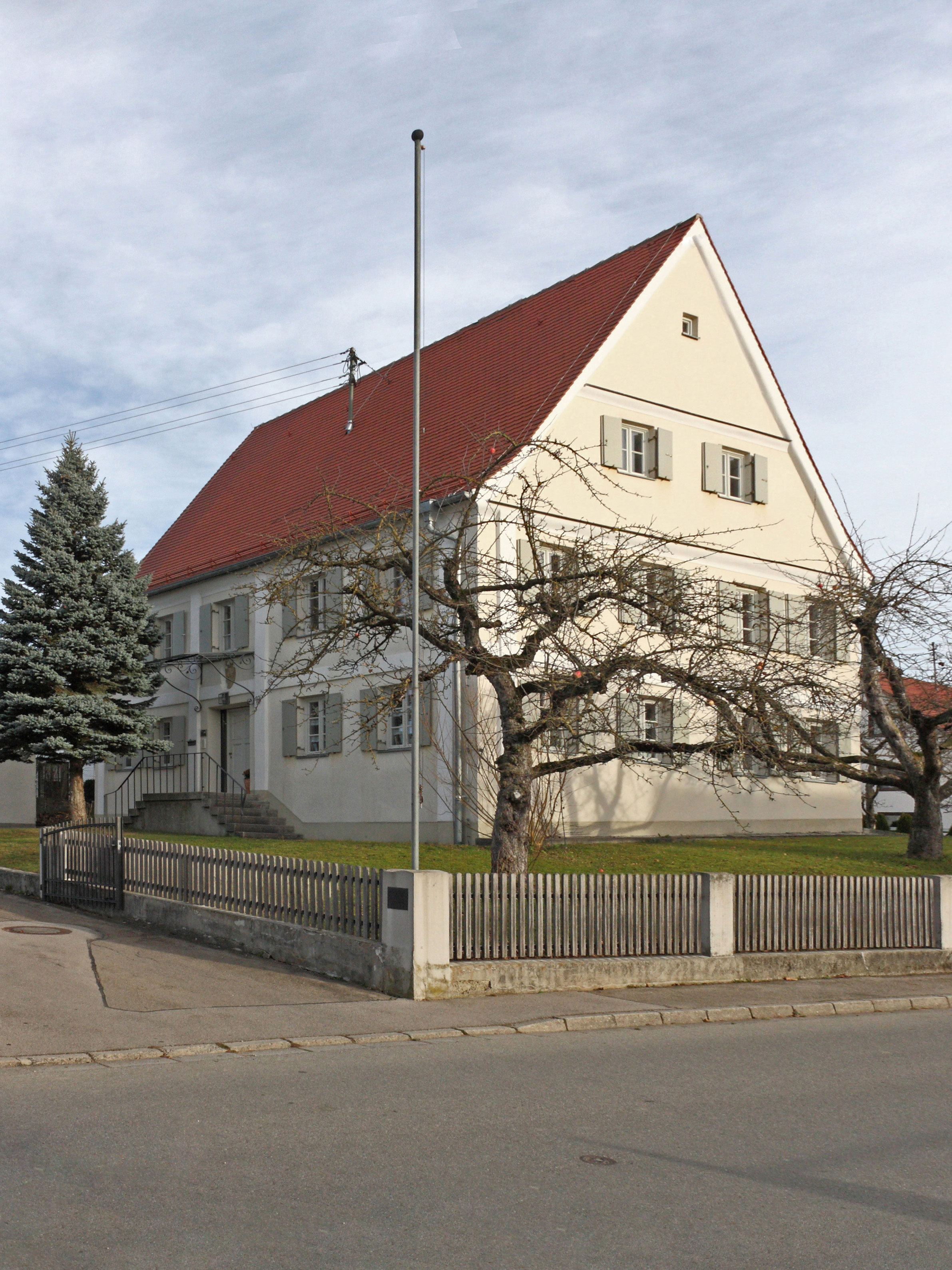 Pfarrhaus von Hselbach, Gemeinde Eppishausen; 1795/96 erbaut